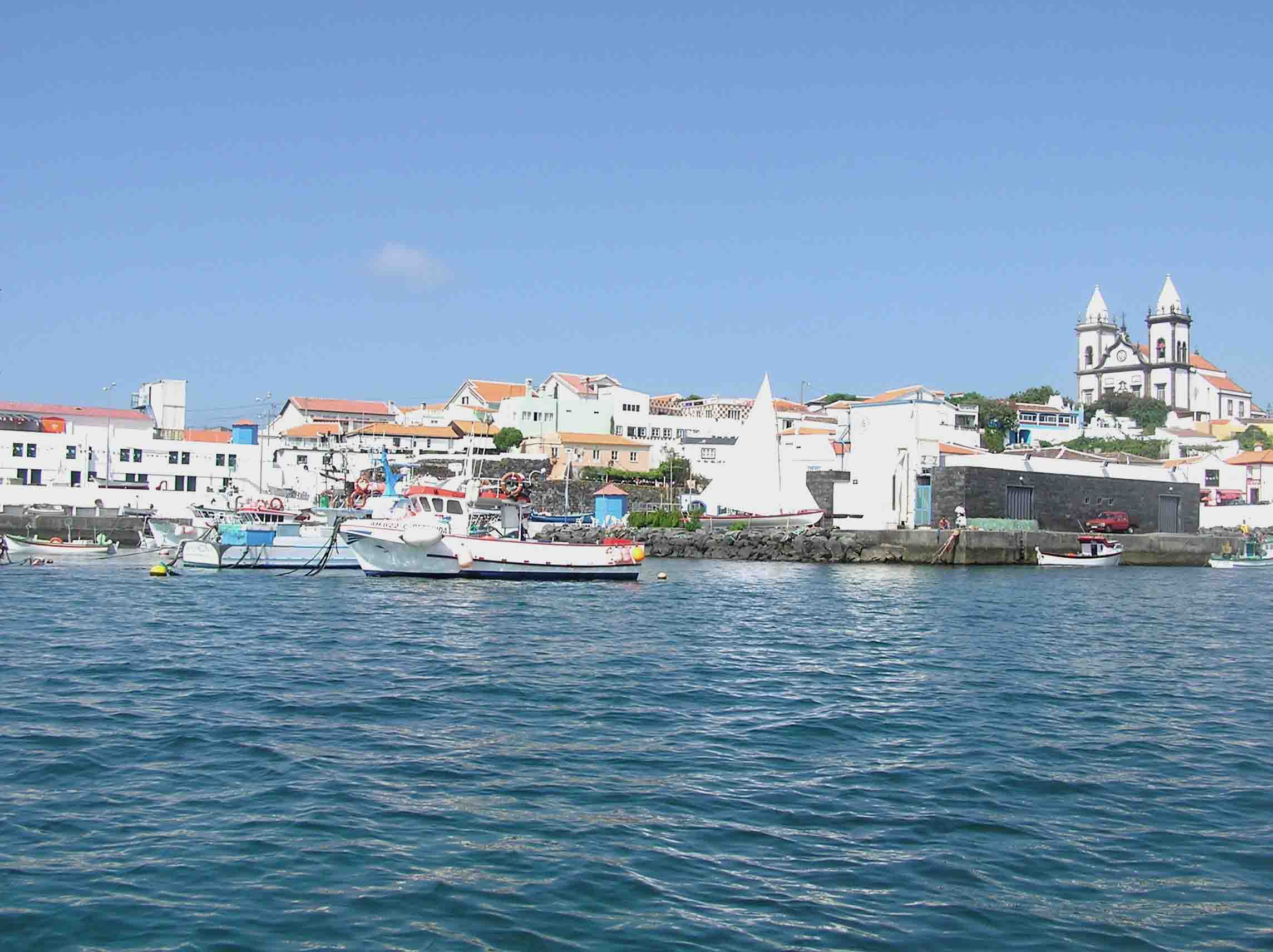 São Mateus da Calheta, Porto, ilha Terceira, Açores, Portugal.